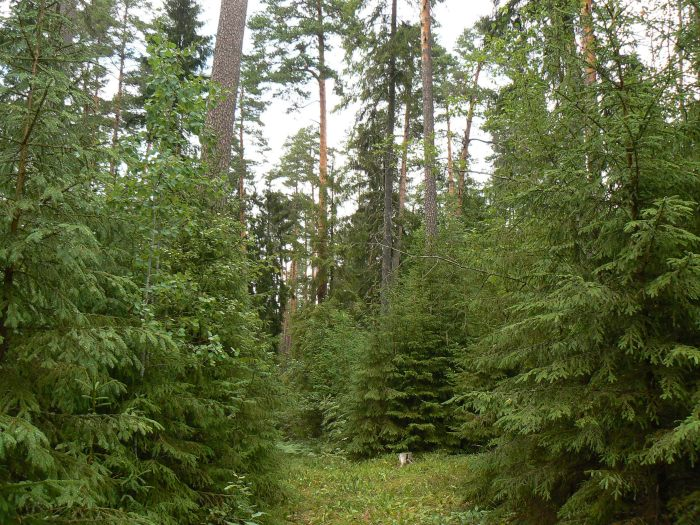 Holdre männikud